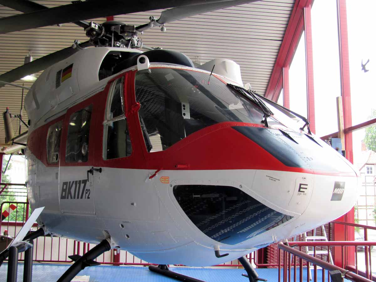 MBB Kawasaki BK 117 P2, fotografiert im Hubschraubermuseum Bückeburg